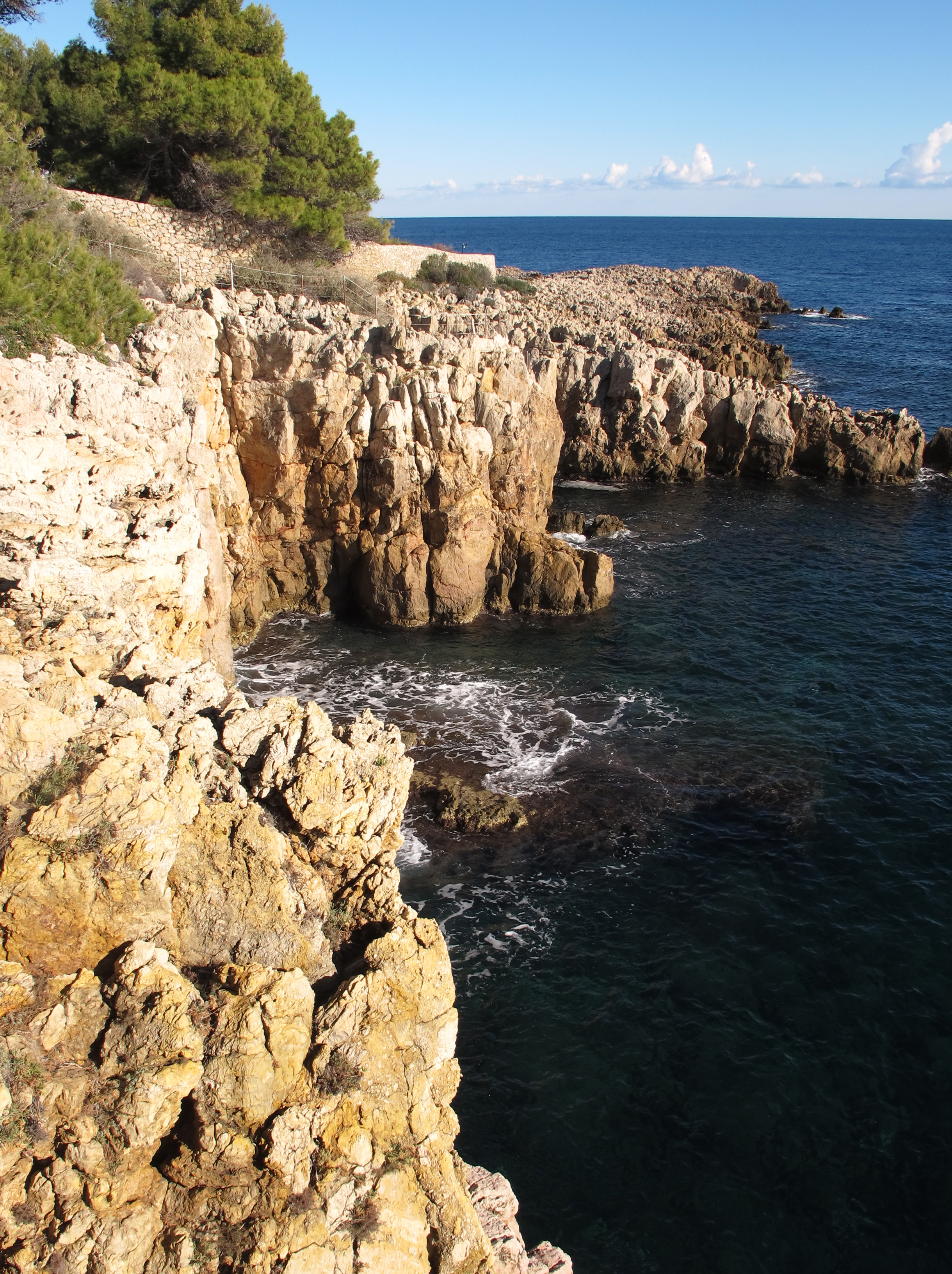 Sentier de Tire-Poil sur le sentier du Littoral au cap d'Antibes, PACA, France